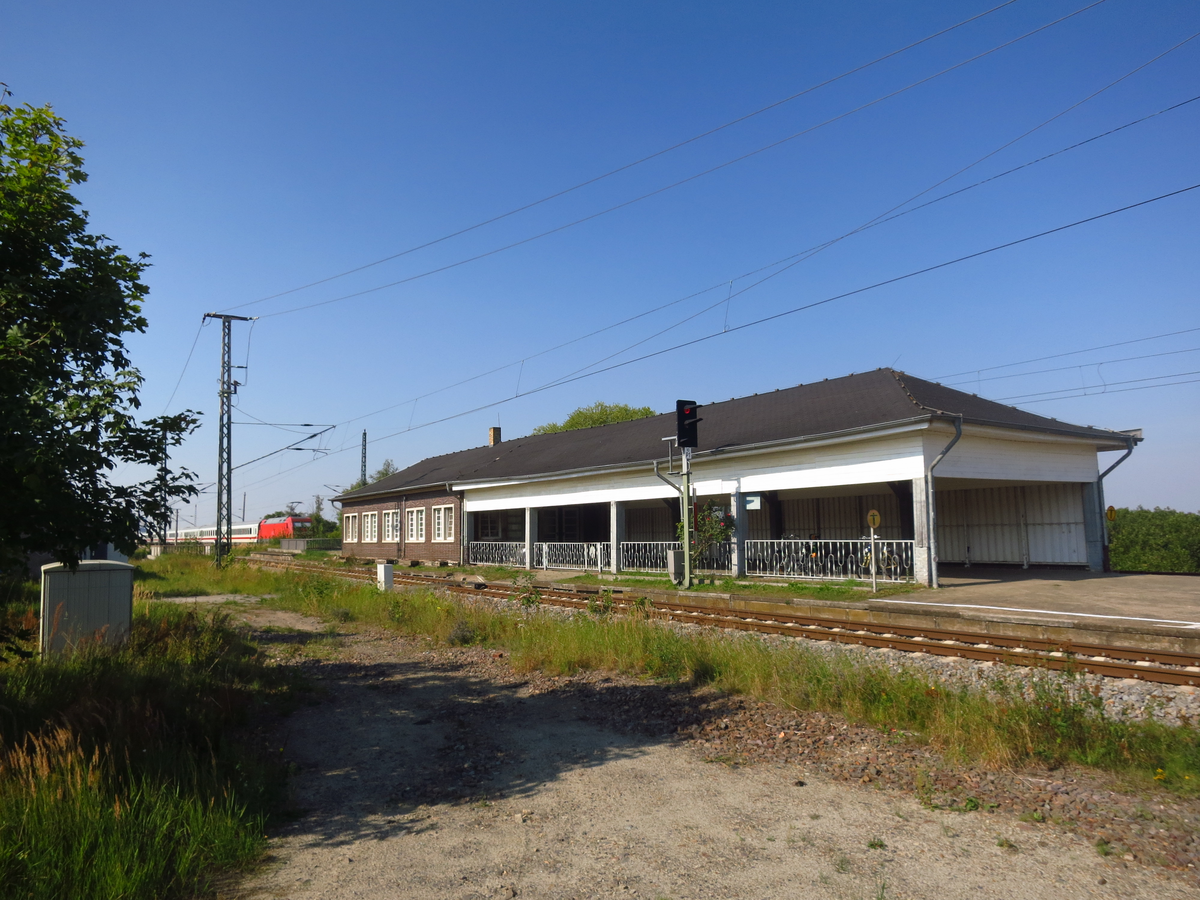 Bahnhof Altefähr, Zugangsgebäude von Südosten